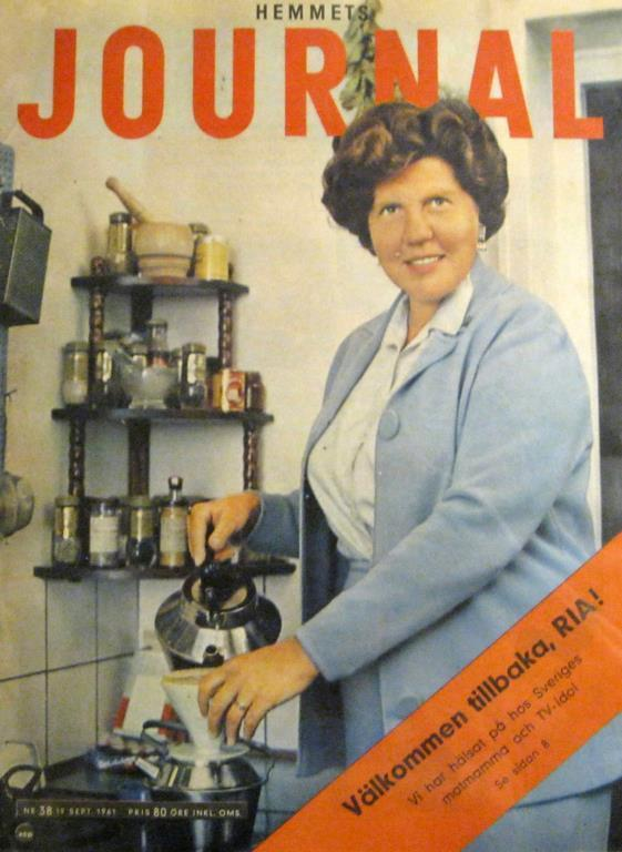 Hemmets Journal nr 38 1961 (Ria Wägner)